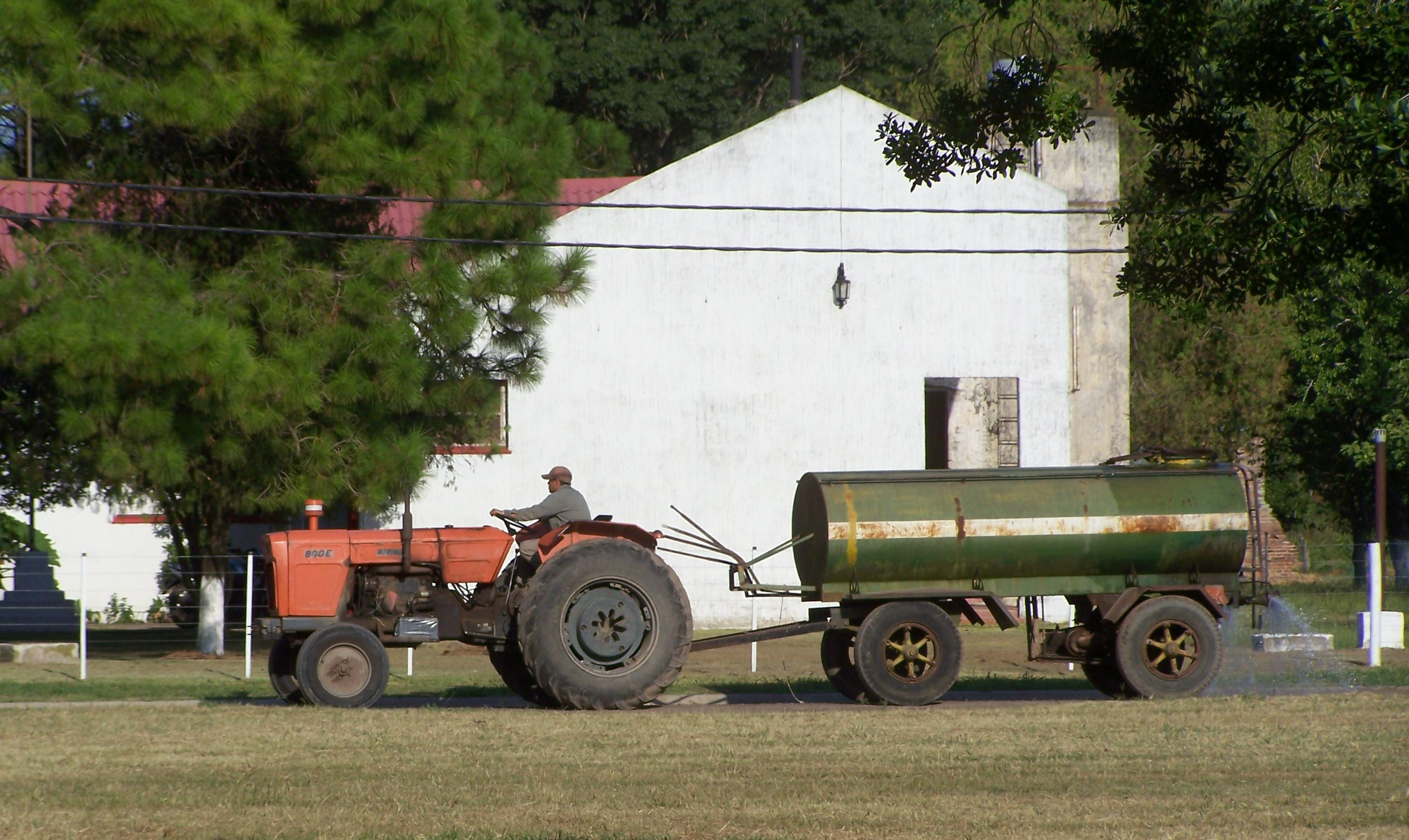 La comuna de Cayastacito mantiene con riego todas sus calles de tierra.